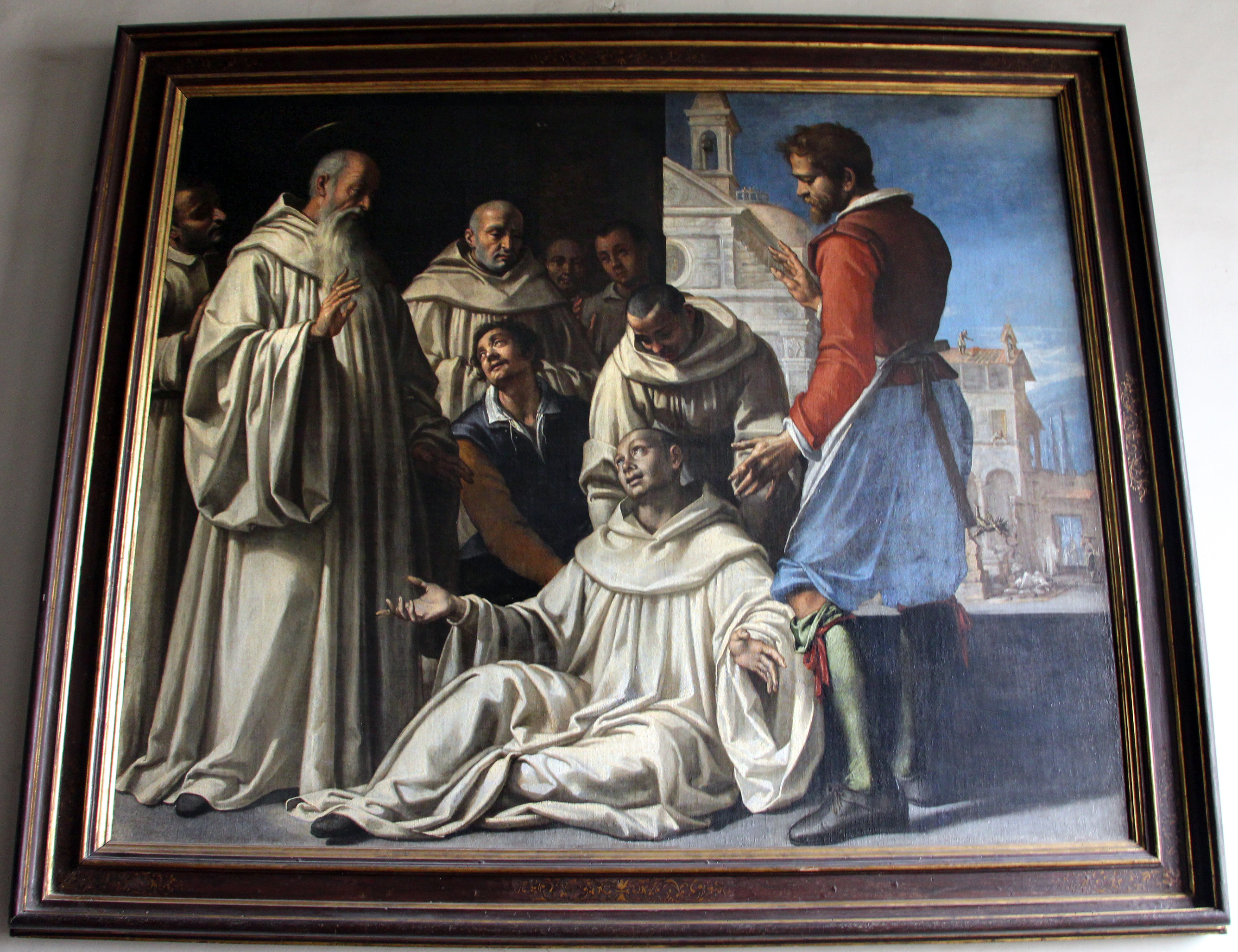 Seminario Arcivescovile Maggiore (Firenze)